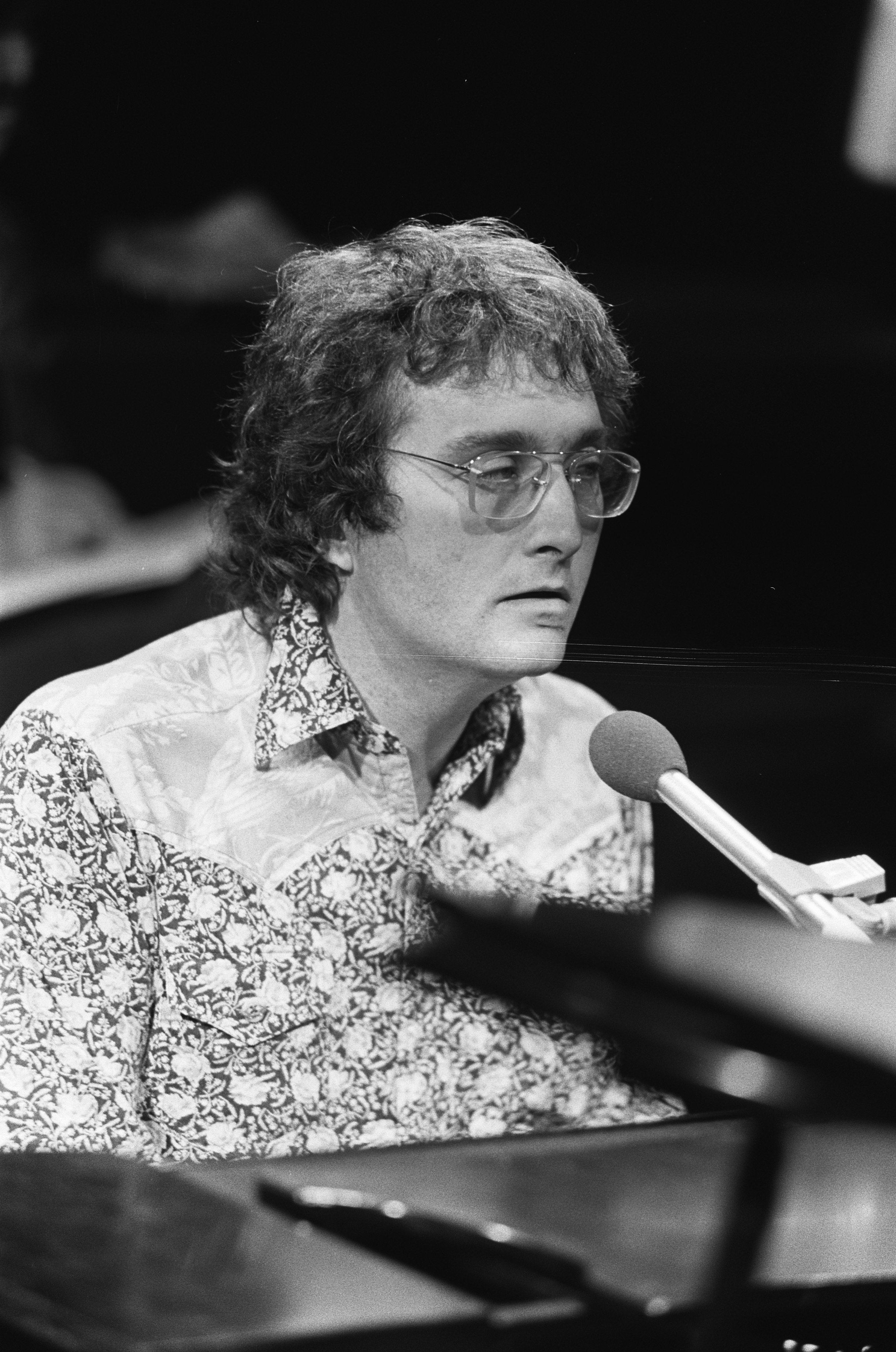 Collectie / Archief : Fotocollectie Anefo Reportage / Serie : [ onbekend ] Beschrijving : TV programma "Music All Inn"; ; zanger Randy Newman in actie Datum : 19 maart 1975 Trefwoorden : artiesten, muziek, muzikanten, portretten, programma's, televisie, zangers Persoonsnaam : Newman, Randy Fotograaf : Bogaerts, Rob / Anefo Auteursrechthebbende : Nationaal Archief Materiaalsoort : Negatief (zwart/wit) Nummer archiefinventaris : bekijk toegang 2.24.01.05 Bestanddeelnummer : 927-8127